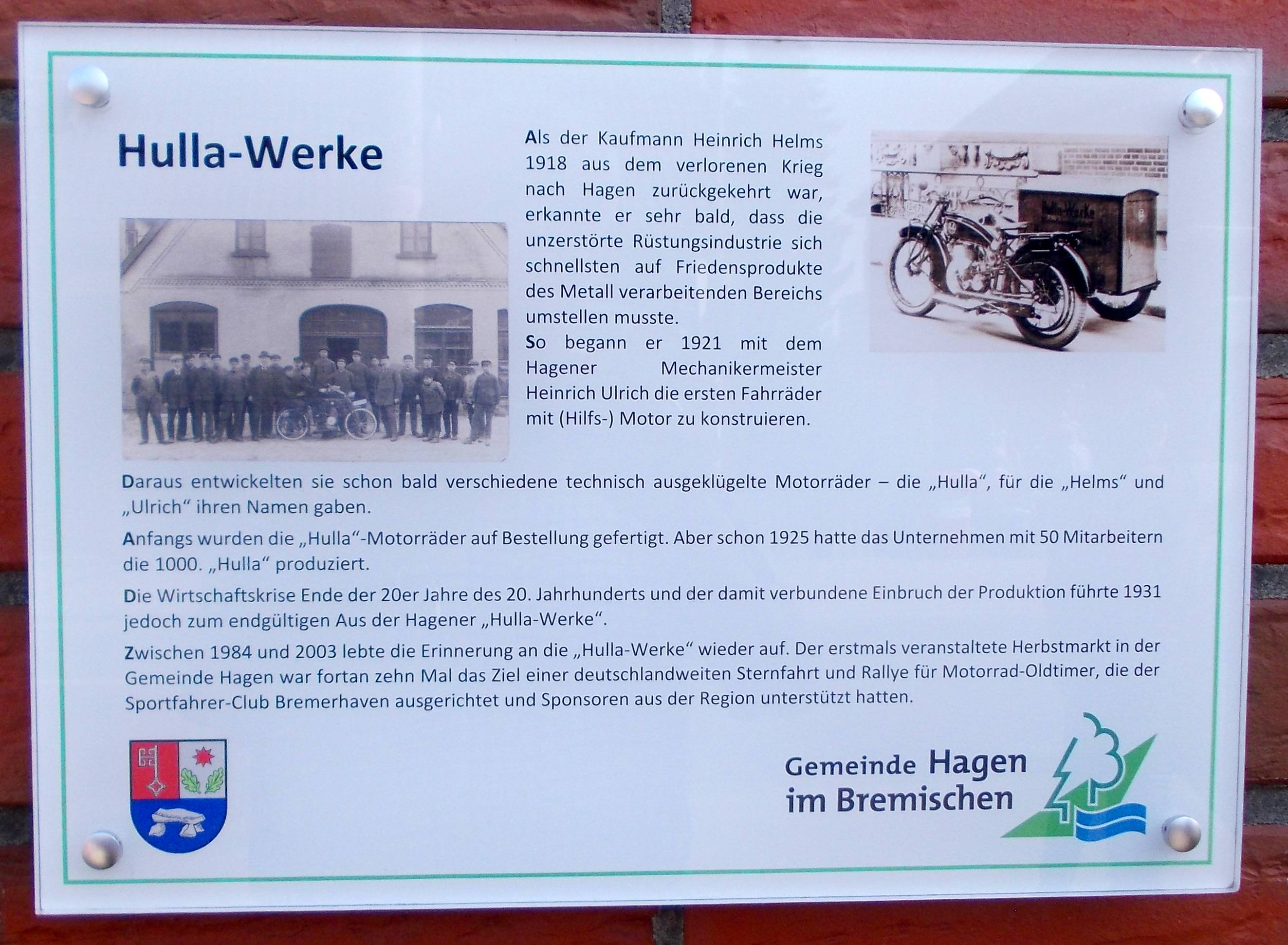 Gedenktafel in Hagen i. Br. in der Straße "Amtsdamm", die an den ehemaligen Standort der Hulla-Werke erinnert.